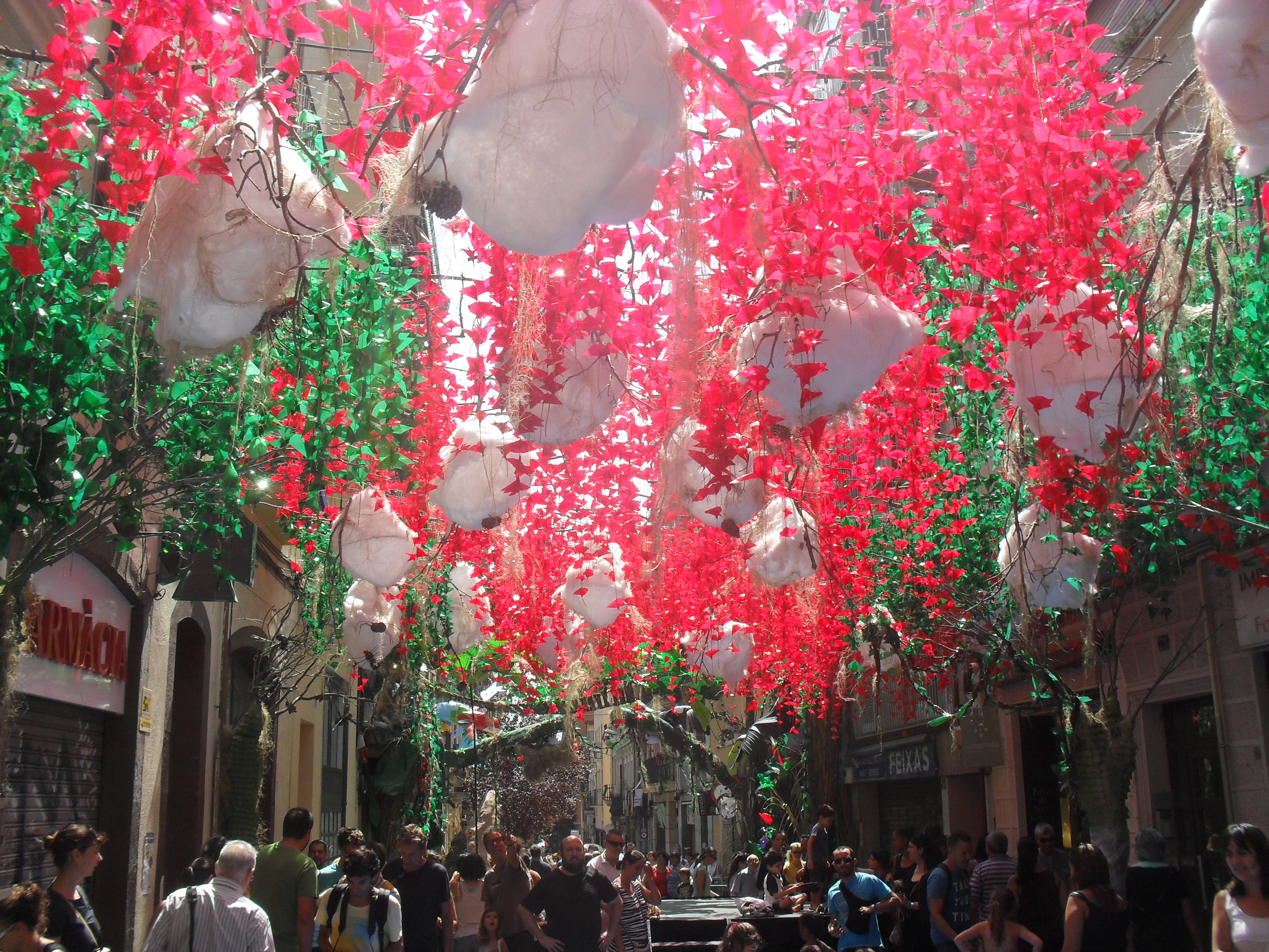 fiesta de gracia Barcelona 2014